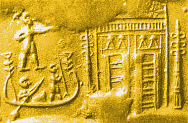 Magur-boat